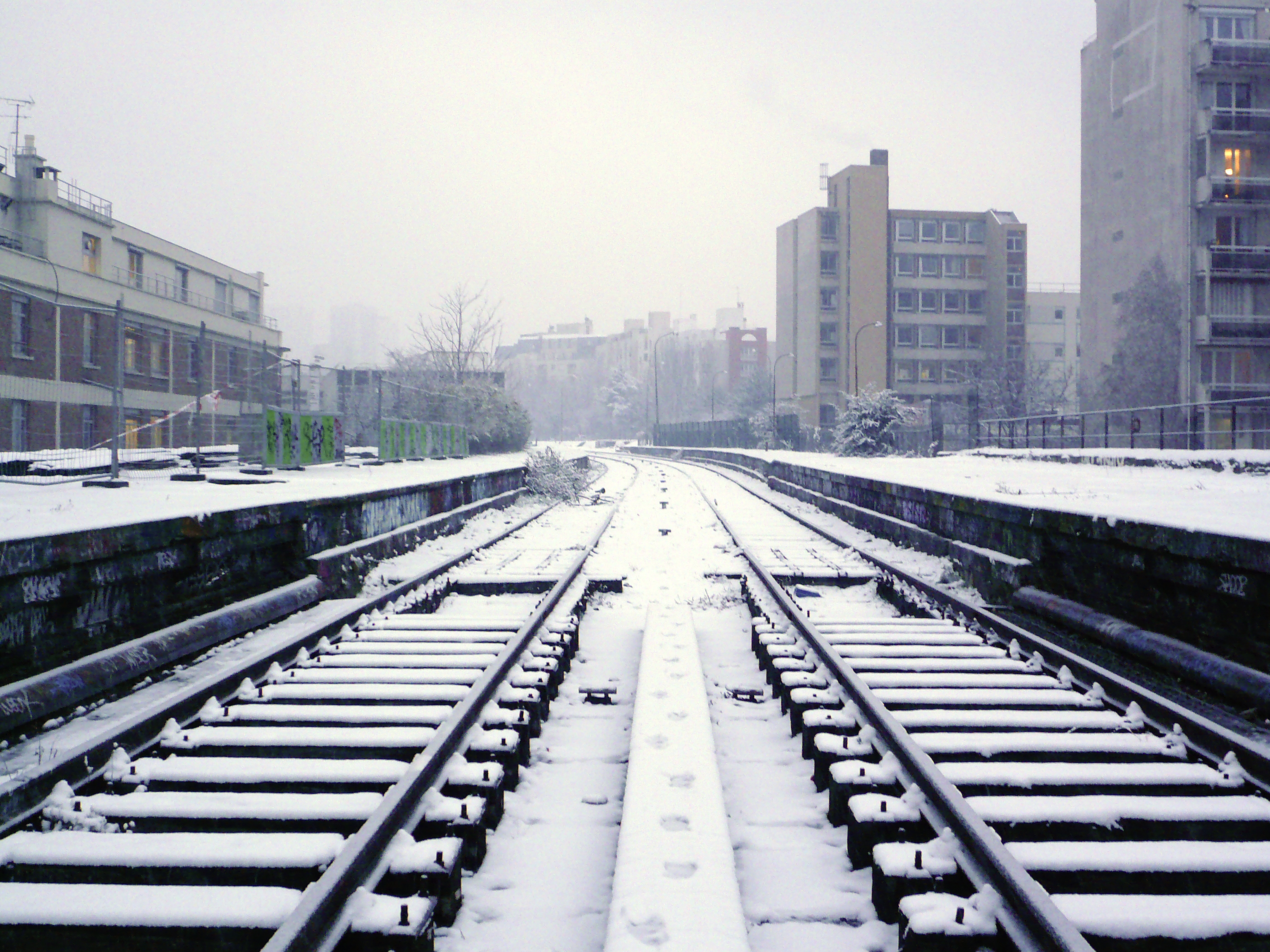 Paris (Île-de-France, France) : La gare de Avenue de Vincennes sous la neige.